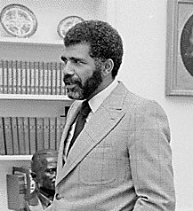 Ed Bradley